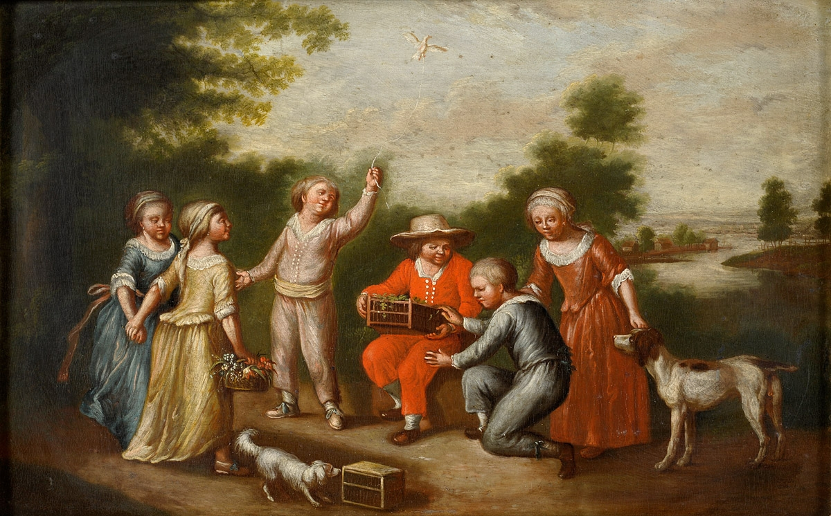 Adlige Kinder beim Spiel in der Natur. Öl auf Holz, 19 x 30 cm. Deutscher Meister Ende 18. Jh.